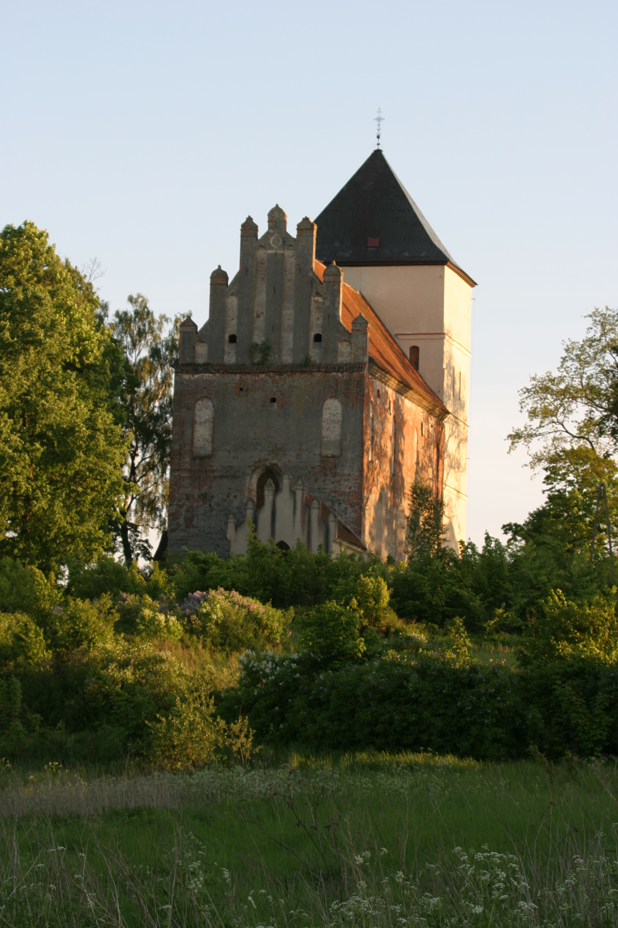 Bezławki, kościół ewangelicki, ob. nieczynny, 1583, 1726-1730, 1884